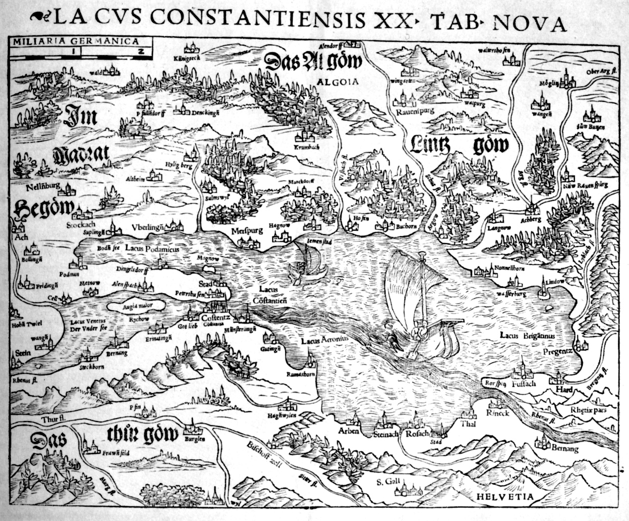 Lacus Constantiensis XX TAB NOVA